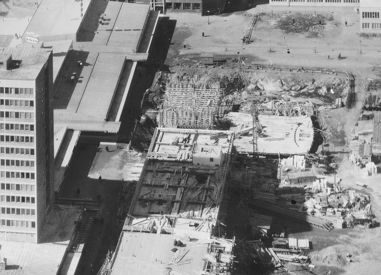 Biograf Rondo i Högdalens centrum under uppförande